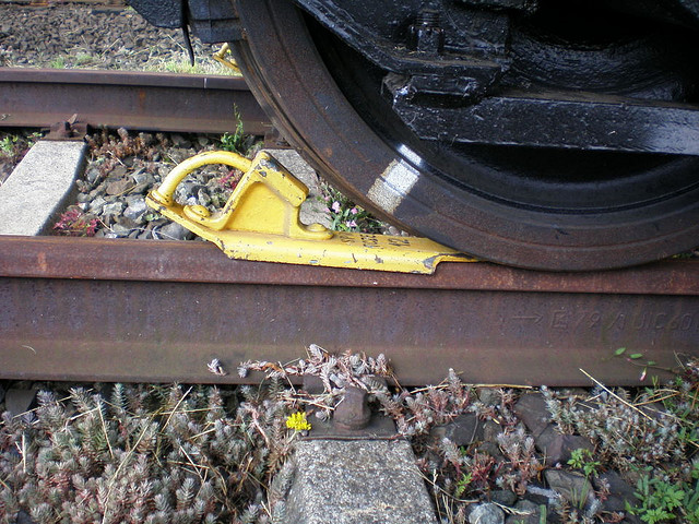 2007.06.17 - 088 Gdynia Główna, wheel stopper (